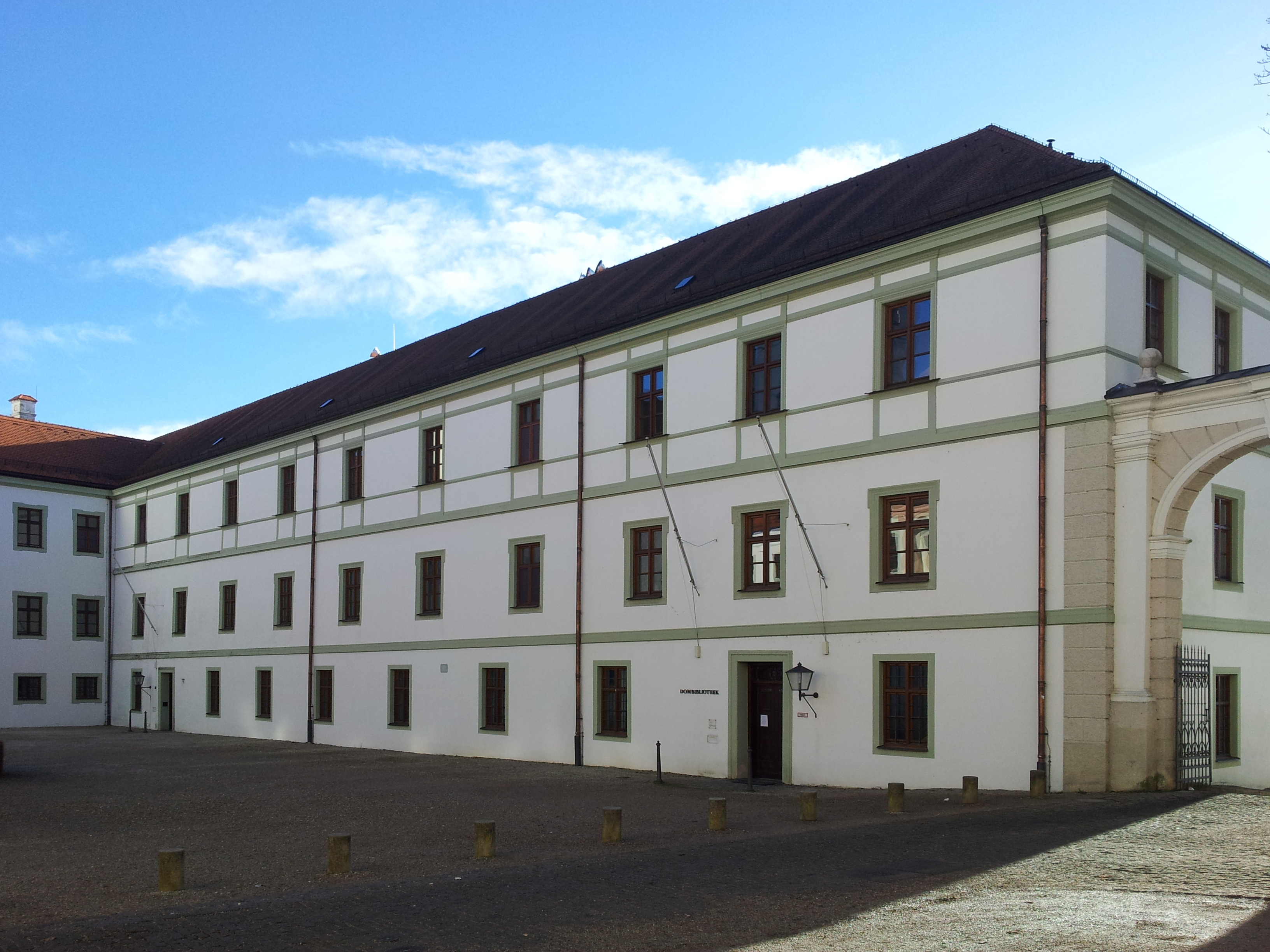 Marstall auf dem Domberg in Freising. Heute Sitz der Dombibliothek